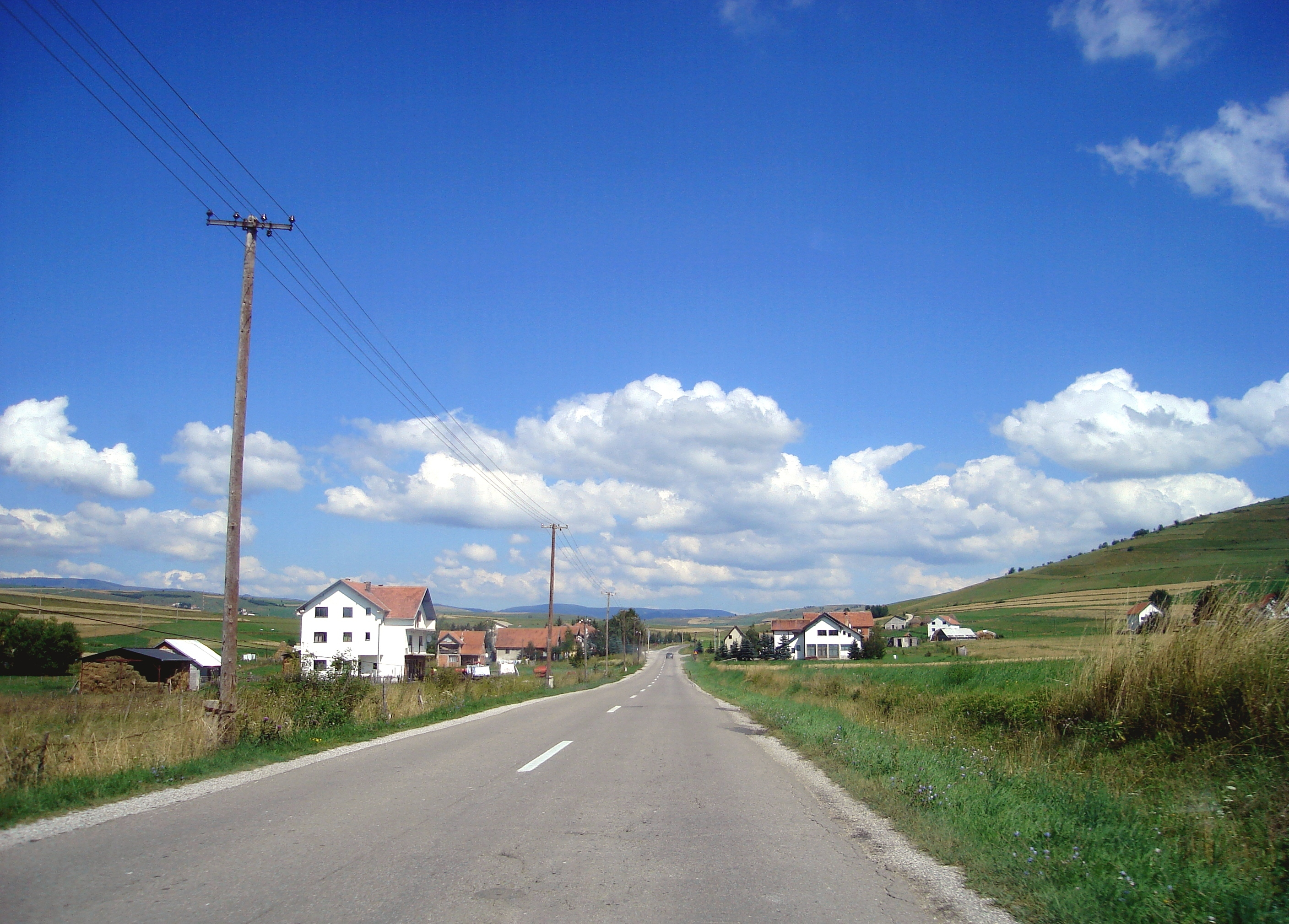 Улазак у варошицу Штаваљ из правца Сјенице,према Дугој Пољани и Новом Пазару....